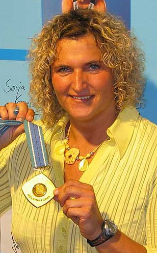 Franka Dietzsch bei einer Pressekonferenz nach Erringen des WM-Titels 2005 im Marktplatz-Center Neubrandenburg